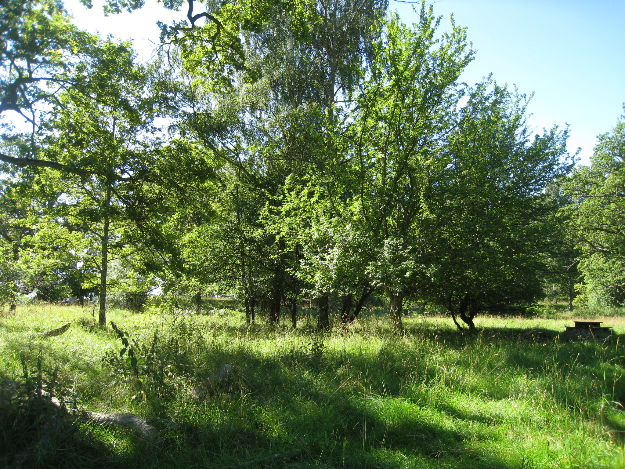 Hummelmora hage i Görvälns naturreservat i Järfälla kommun i Stockholms län.